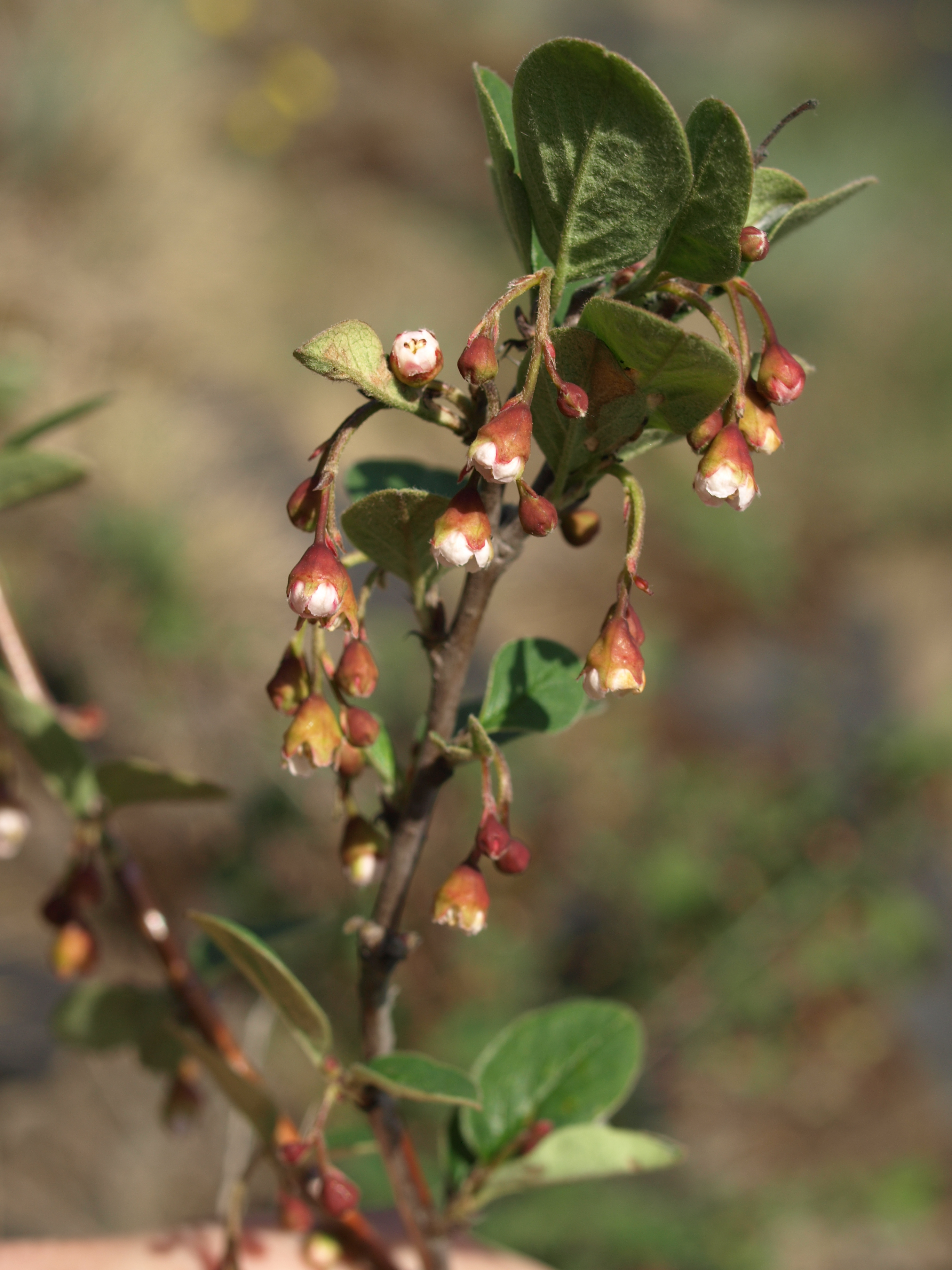 Sedlecká skály (přírodní pamtáka) - jaro - Cotoneaster integerrimus Med., skalník celokrajný - status ohrožení v ČR: C4a (vzácnější taxony vyžadující pozornost)